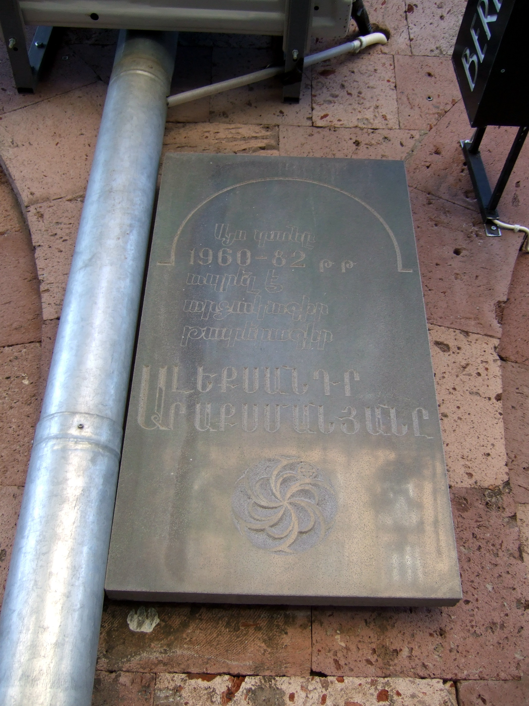 Այս տանը ապրել է արձակագիր թատերագիր Ալեքսանդր Արաքսմանյանը, Կասյան փ․